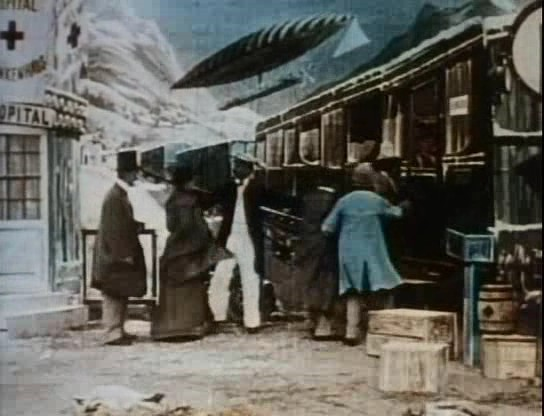 Méliès, Le voyage a travers l'impossible1904 colorizée 16